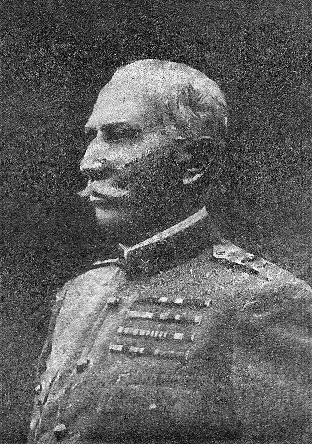 Giovanni Battista Ameglio